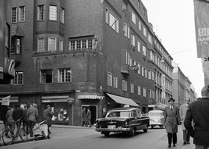 Hörnet Nybrogatan 11 / Riddargatan 7